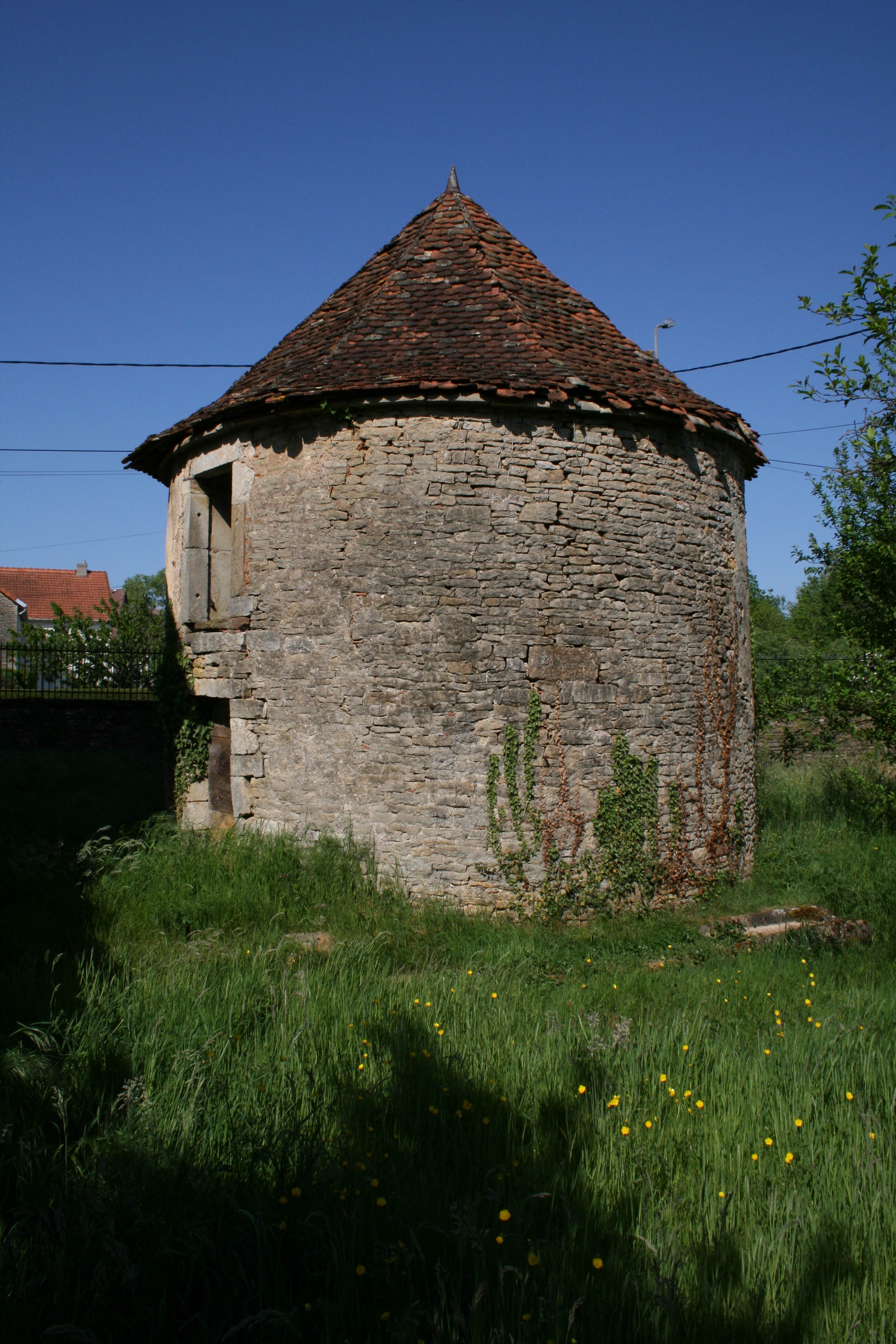 Borey Pigeonnier